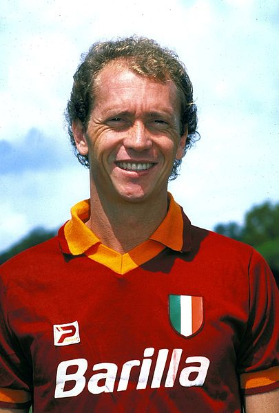 allenatore e calciatore brasiliano